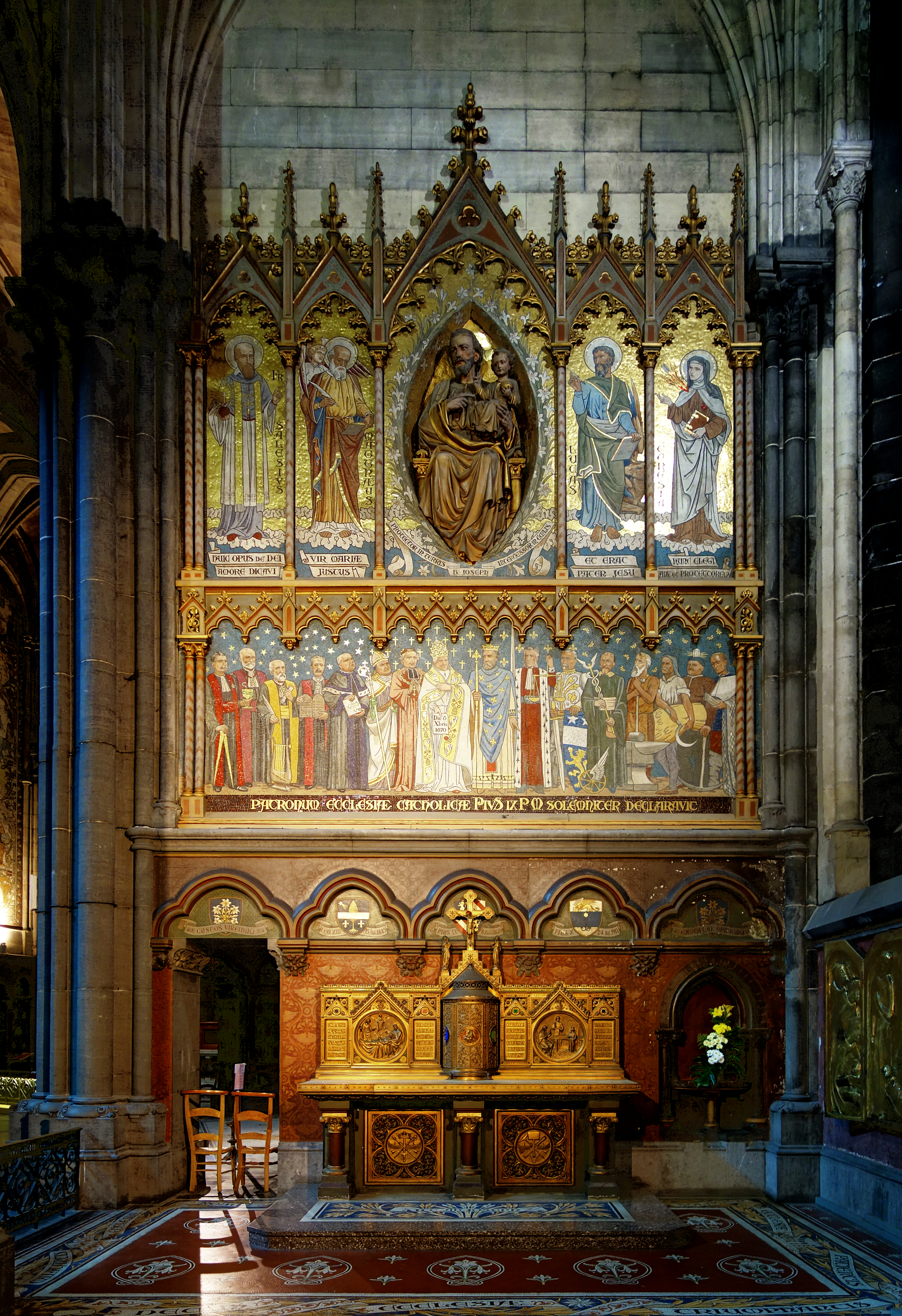 La chapelle de saint Joseph dans la cathédrale Notre-Dame de la Treille de Lille. .